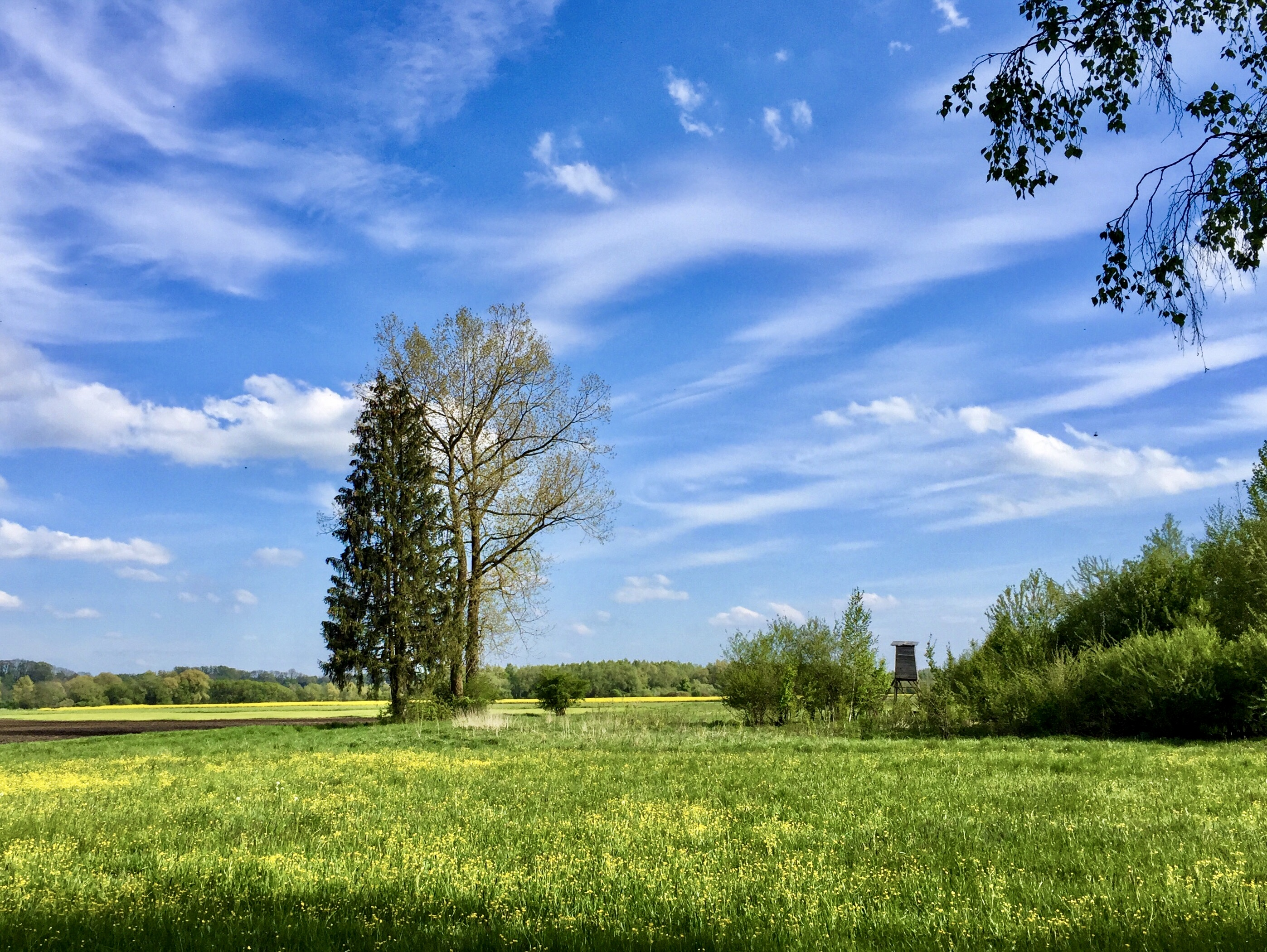 Wiese im Bremental bei Jettingen-Scheppach